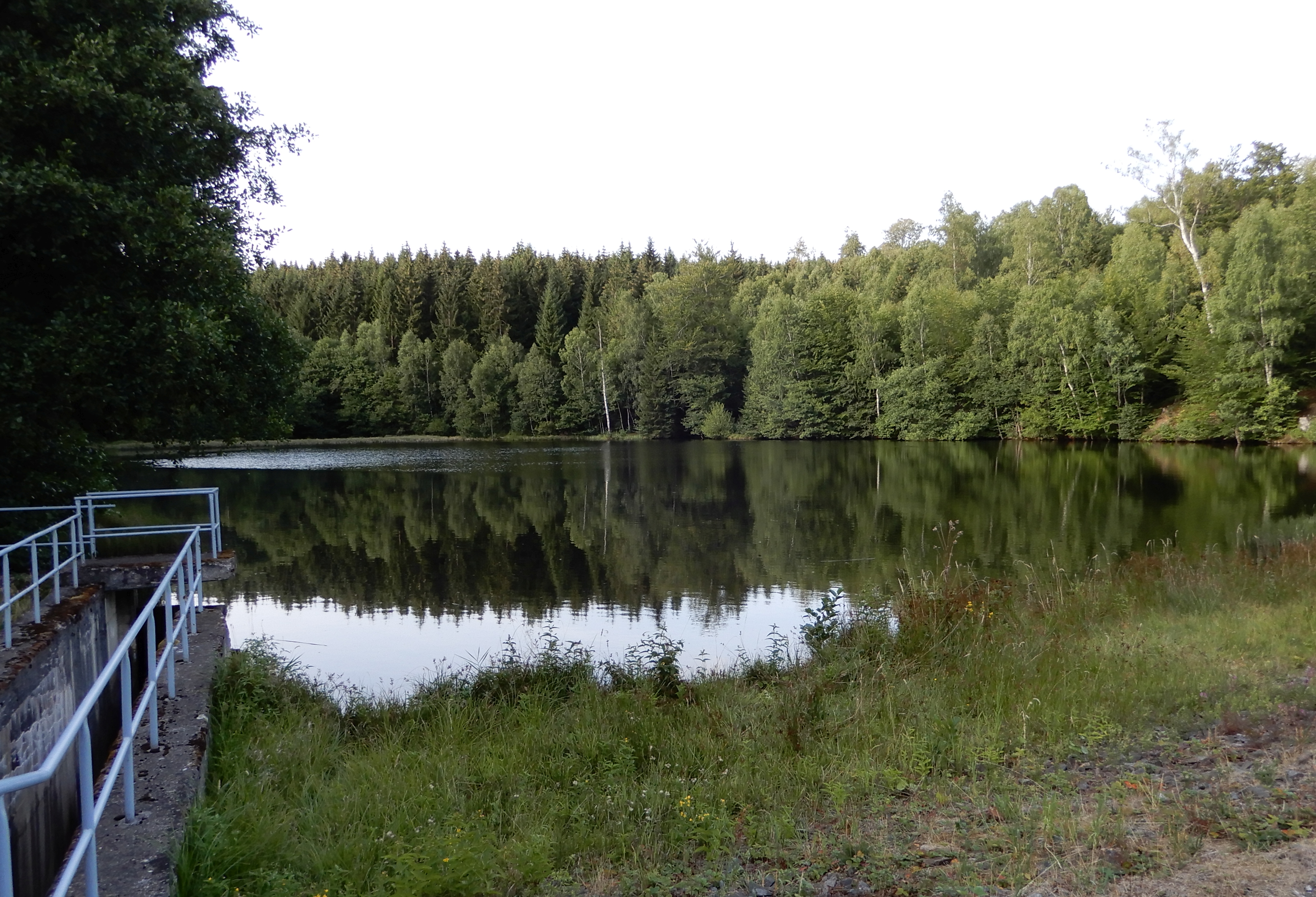 Erichsburger Teich unterhalb des Bergrat-Müller-Teichs